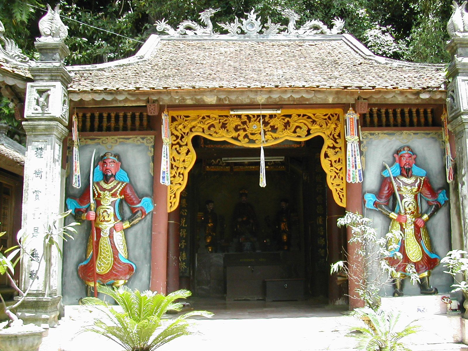 A temple in Perfume Pagoda.